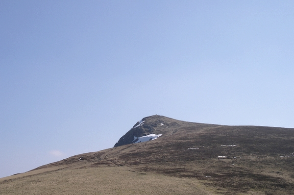 Le Rothenbachkopf